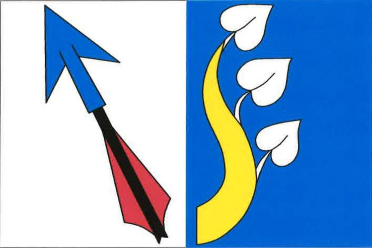 Vlajka, Drahonice, okres Strakonice